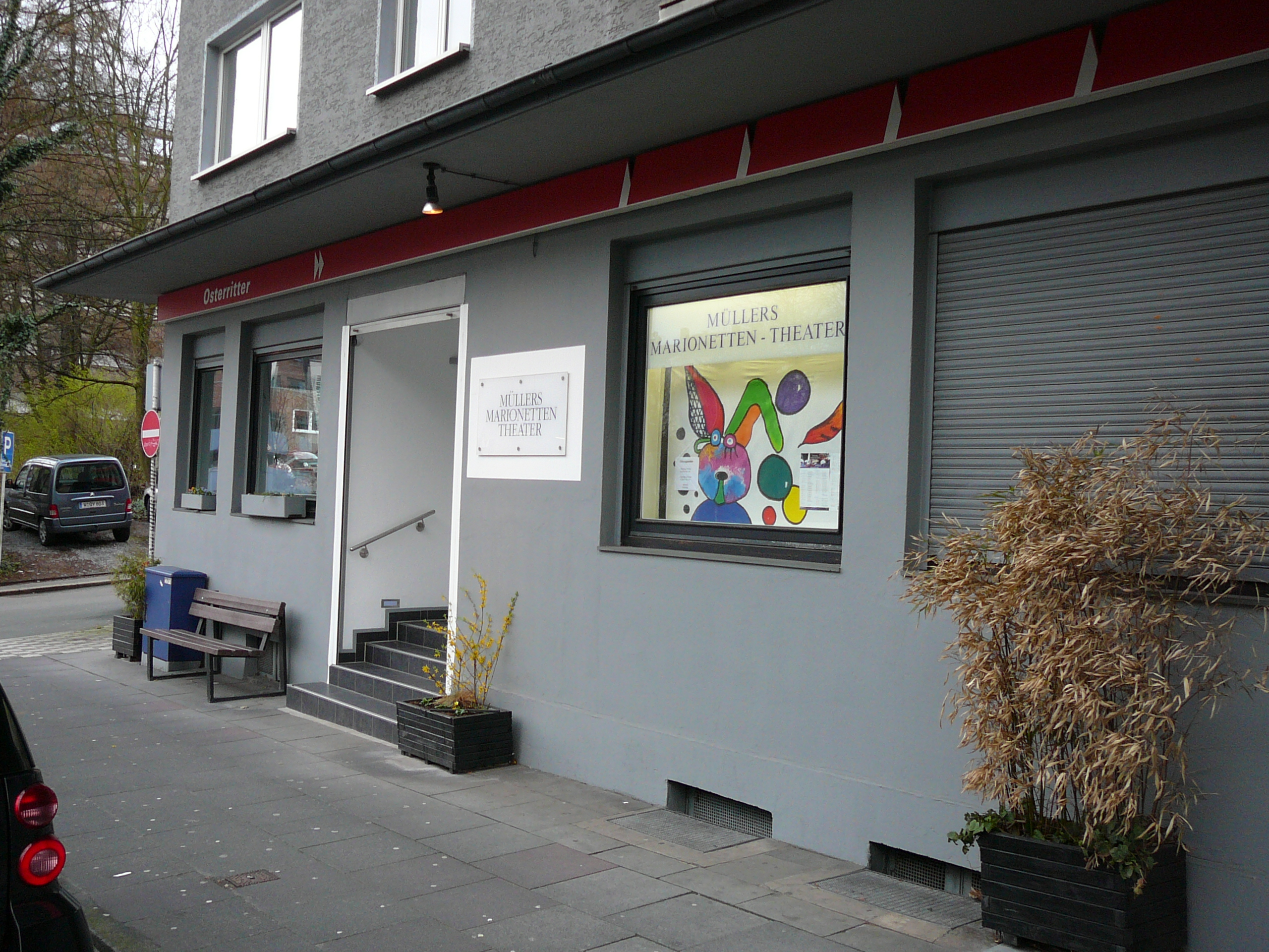 Neuenteich, Wuppertal